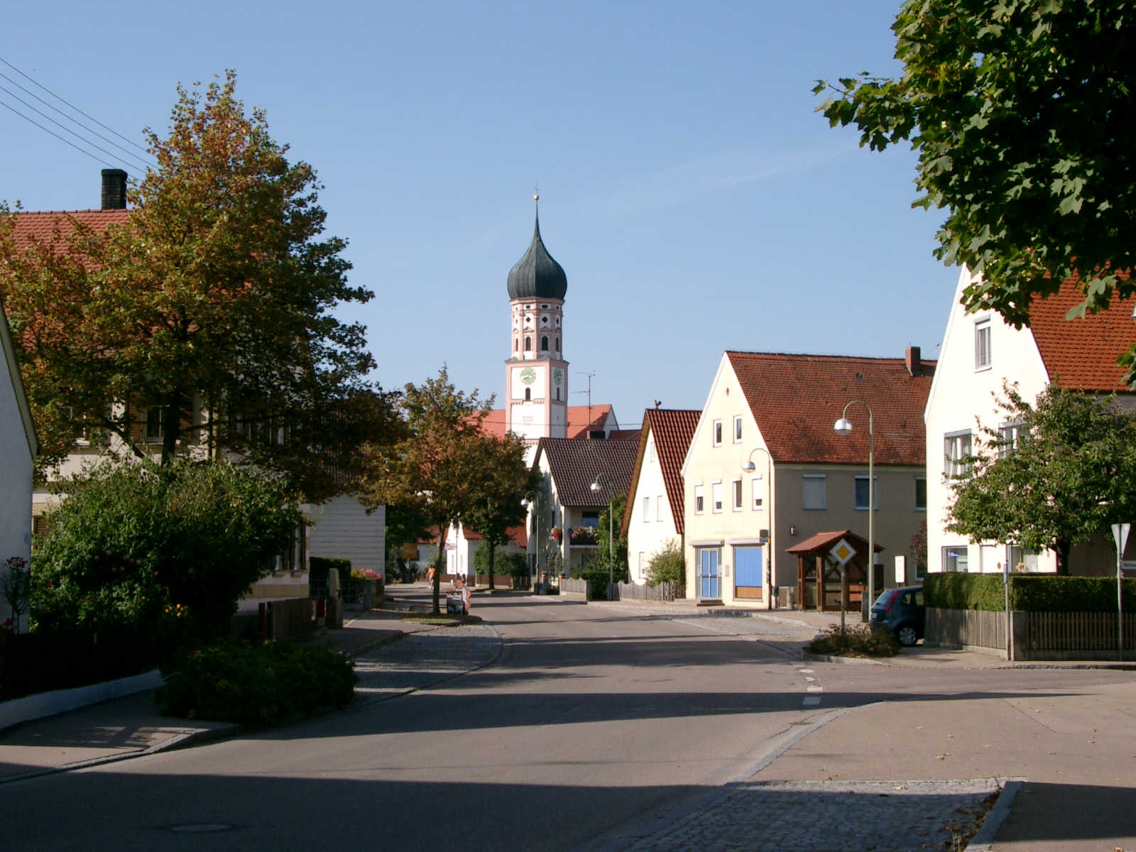 Zentrum von Mertingen